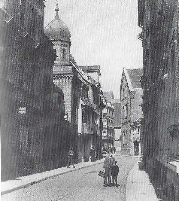 Kleine Brauhausstraße in Halle (Saale), links die alte hallische Synagoge, Blick aus südlicher Richtung.